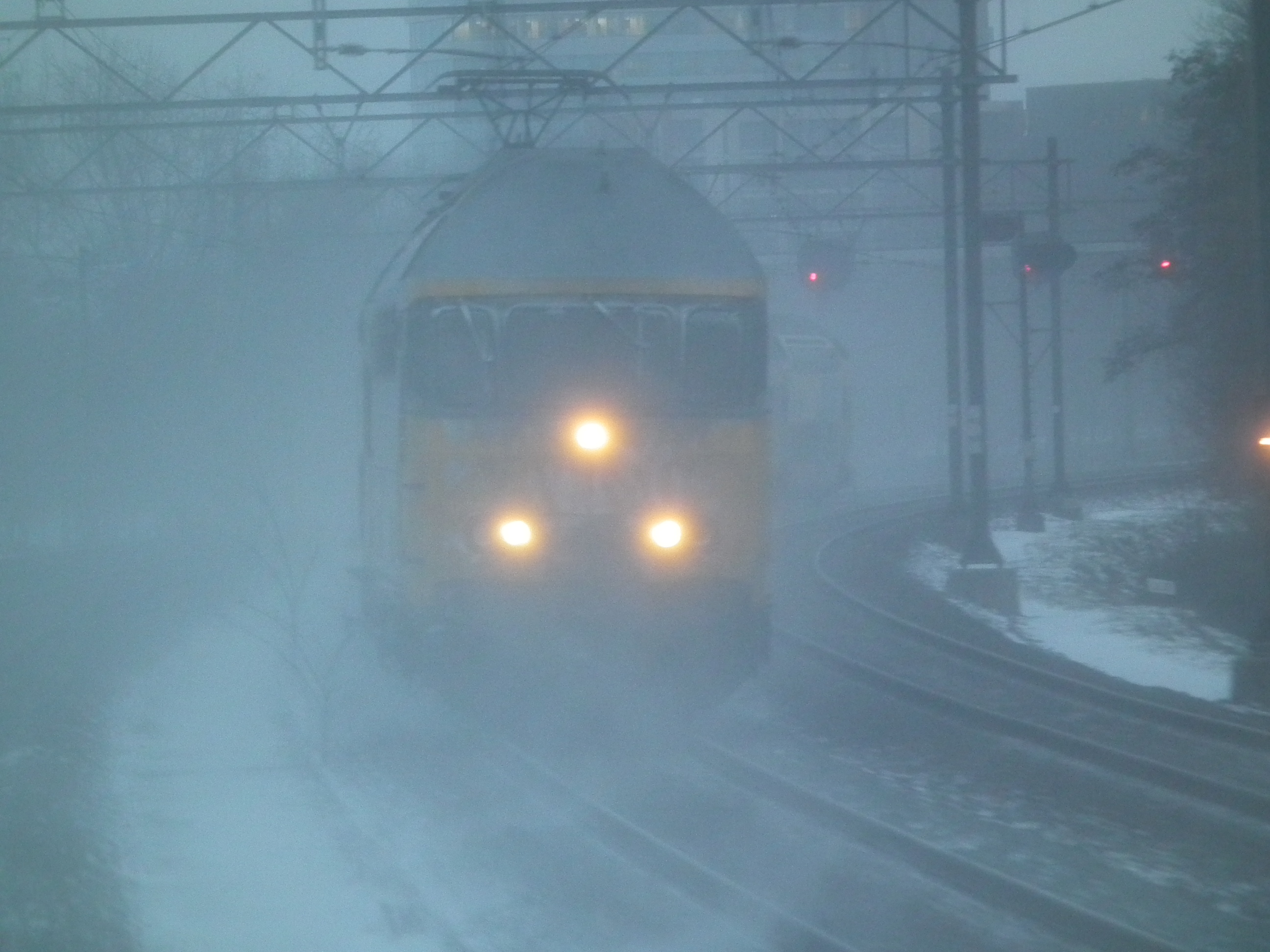 Stuifsneeuw. De sneeuw stuift tijdens een rit hoog op.Uit het dossier seizoenen, over de invloed van het weer op de dienstregeling van de Nederlandse Spoorwegen.